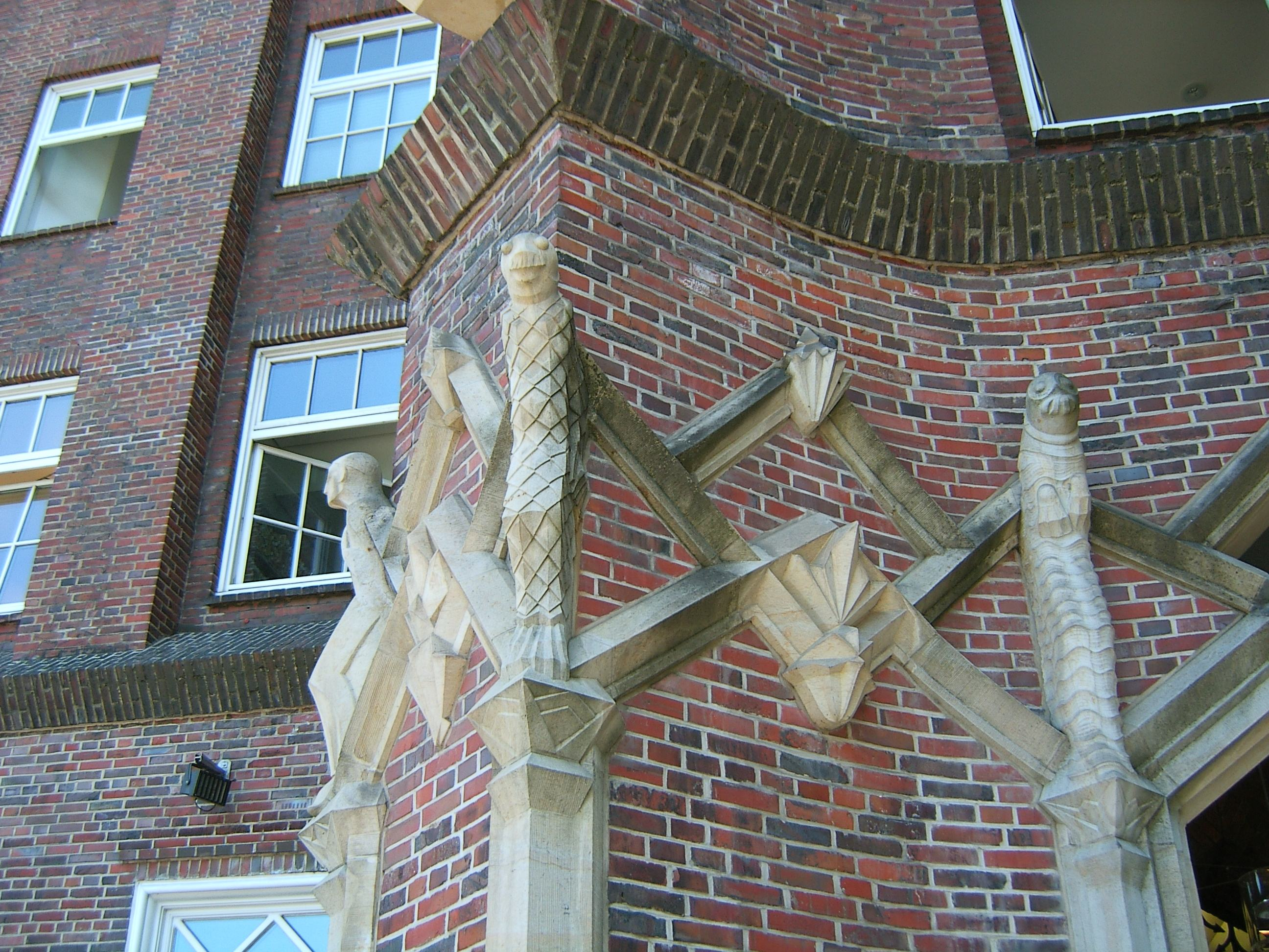 Skulpturen am Meßberghof in Hamburg-AltstadtThis is a photograph of an architectural monument.